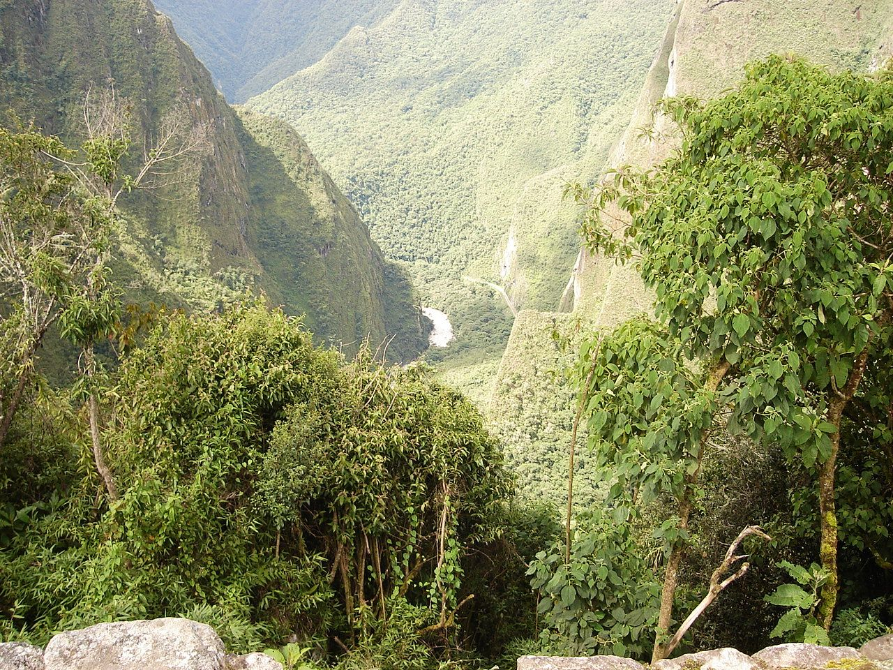 Foto tirada por mim, em Machu Picchu.